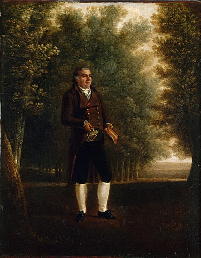 Portrait de François Cacault, sénateur